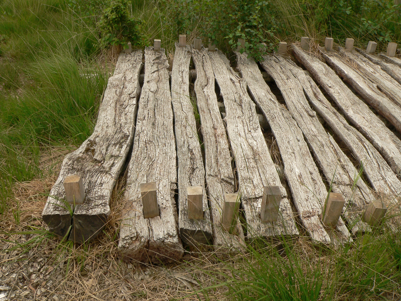 Rekonstruierter vorgeschichtlicher Moorweg am Moorerlebnispfad Diepholz